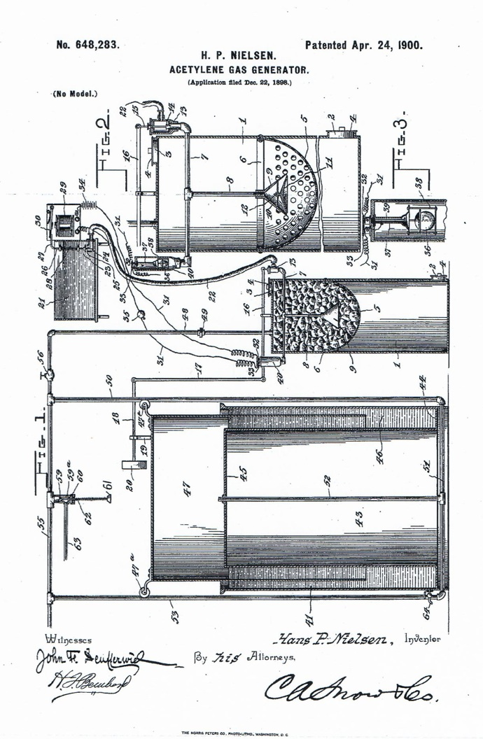 Image from US Patent 648283 registered by HP Nielsen